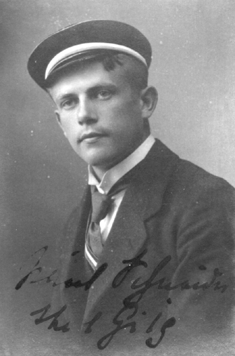 Bildbeschreibung: Paul Schneider als Student in Gießen mit der Couleur des Gießener Wingolf Datum: 1920 Warum PD-alt? Wer ist der Urheber, wann ist er verstorben? --88.134.45.204 15:27, 27. Jun 2006 (CEST) siehe oben! Benutzer ist als Archivar zur Freigabe berechtigt --Gleiberg 09:17, 29. Jun 2006 (CEST) Nachdem keine weitere Reaktion der IP erfolgt ist wurde das ursprüngliche License-Tag wieder hergestellt. --Gleiberg 23:20, 9. Jul 2006 (CEST) Die Rechtsgrundlage würde ich ja gerne mal sehen. "als Archivar zur Freigabe berechtigt" - solange der Urheber nichts davon mitbekommt, mag das stimmen. --AndreasPraefcke (talk) 08:44, 9 December 2009 (UTC)